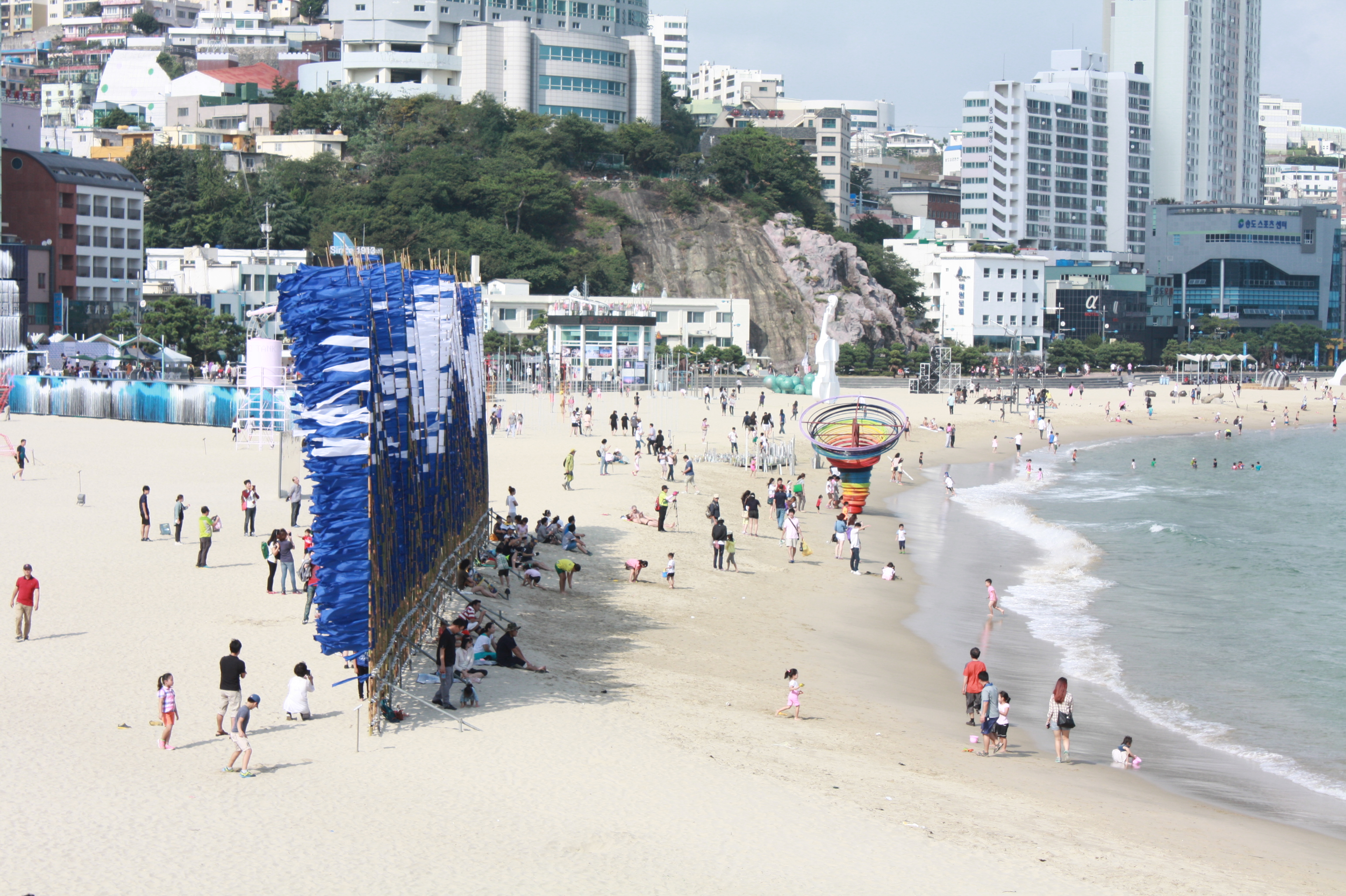 2013바다미술제가 개최된 부산 송도해수욕장의 전경 Sea Art Festival 2013